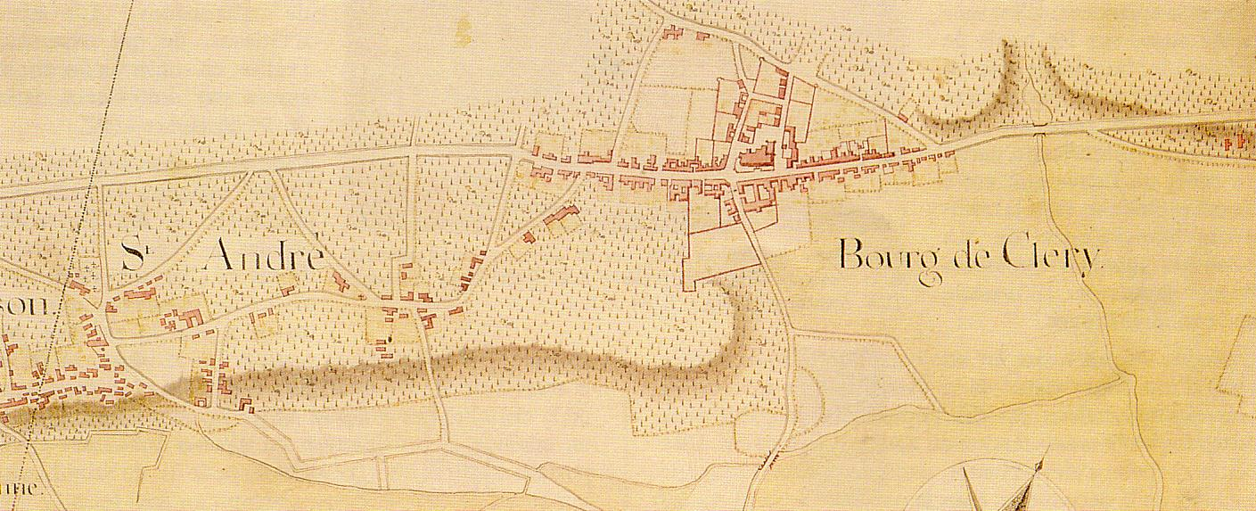 Plan_de_Cléry_au_18e_siècle